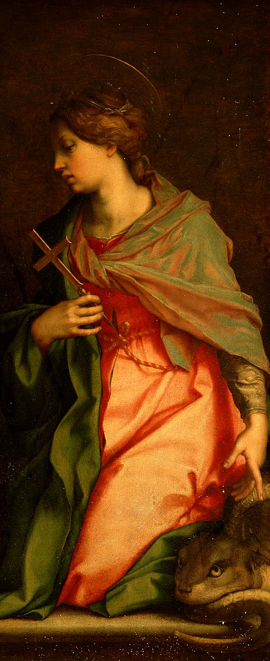 Andrea del Sarto (1486 - 1530), Santa Margherita di Antiochia, Pisa, Duomo